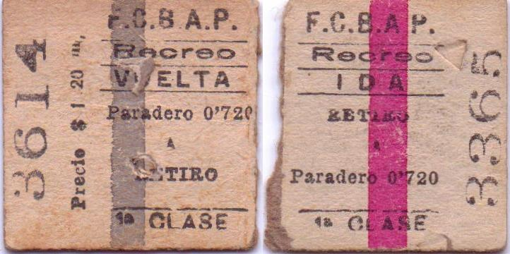 Tickets by the Buenos Aires and Pacific Railway.